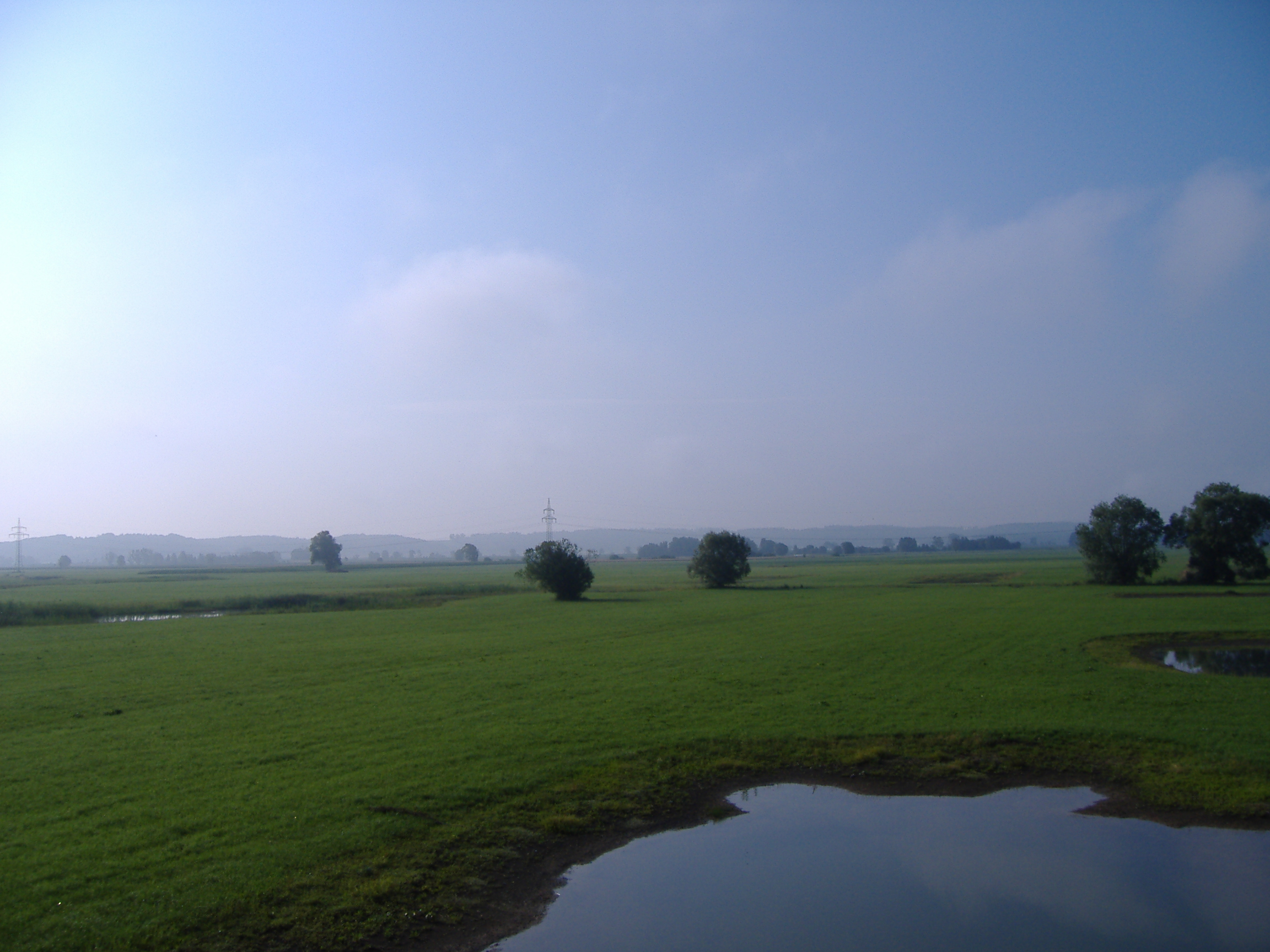 Vogellebensraum östl. Donauried